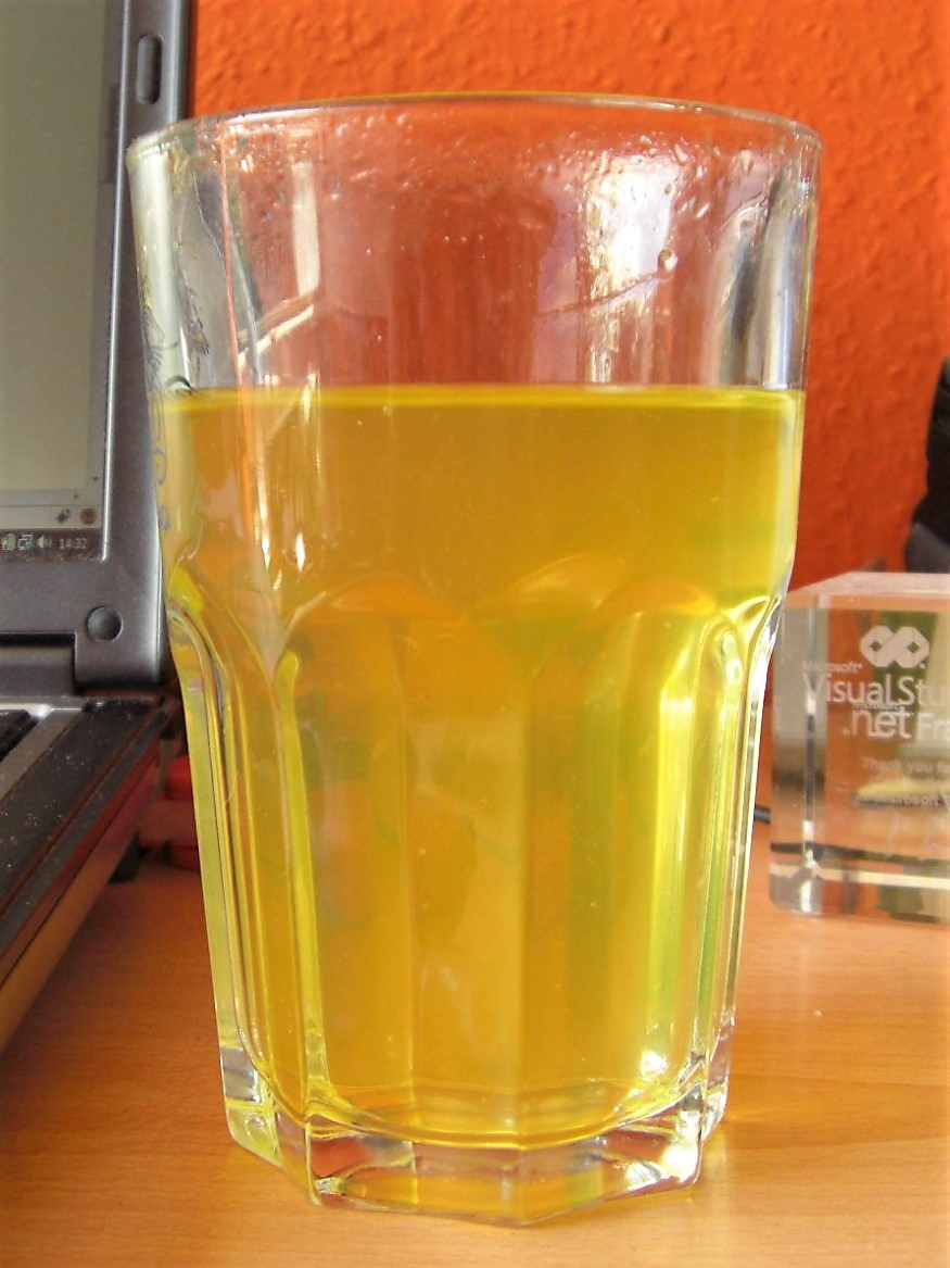 Ein Glas Brause mit Zitronen-Geschmack.